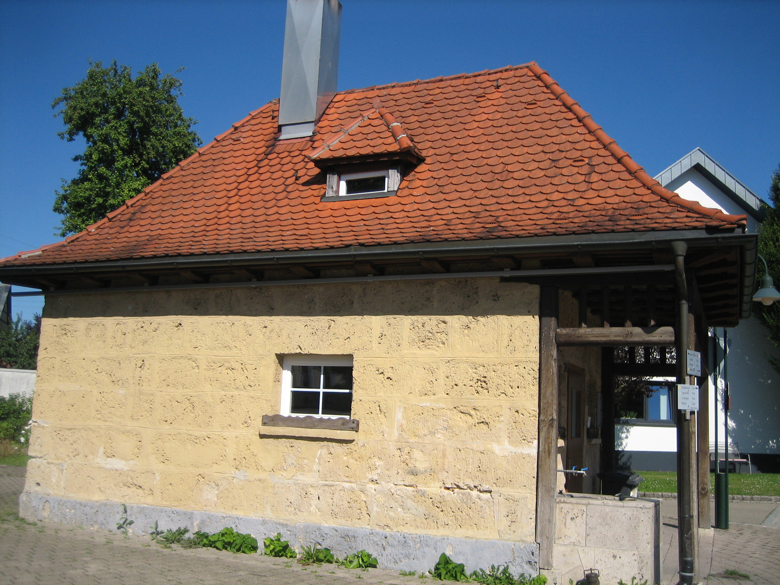 Backhaus Sontheim Heroldstatt